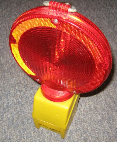 Eine Typische Warnlampe